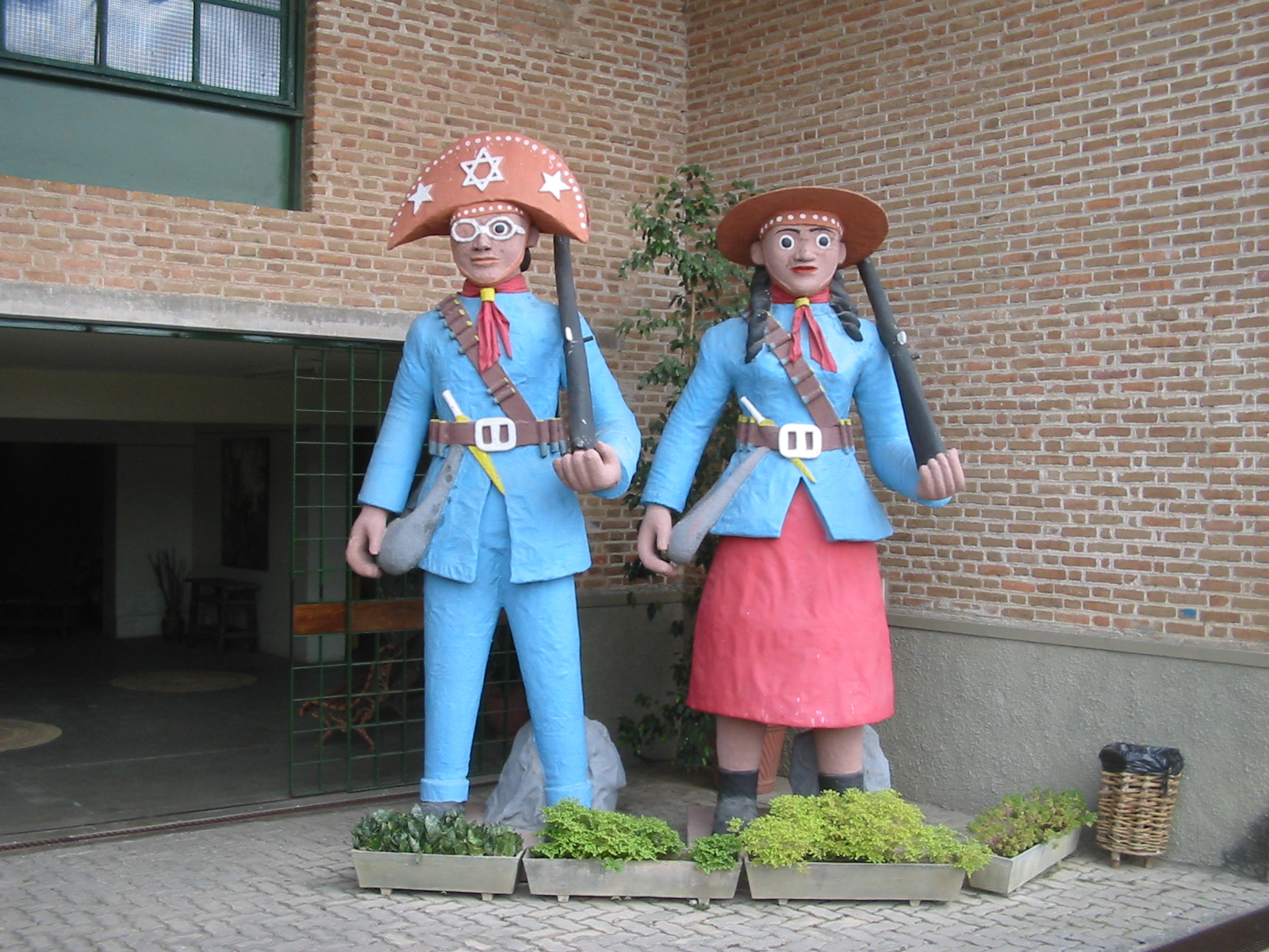 Figuras de barro na entrada do Museu, onde há exposições permanentes para Luiz Gonzaga e Elba Ramalho, além de figuras de barro. e artesanato.